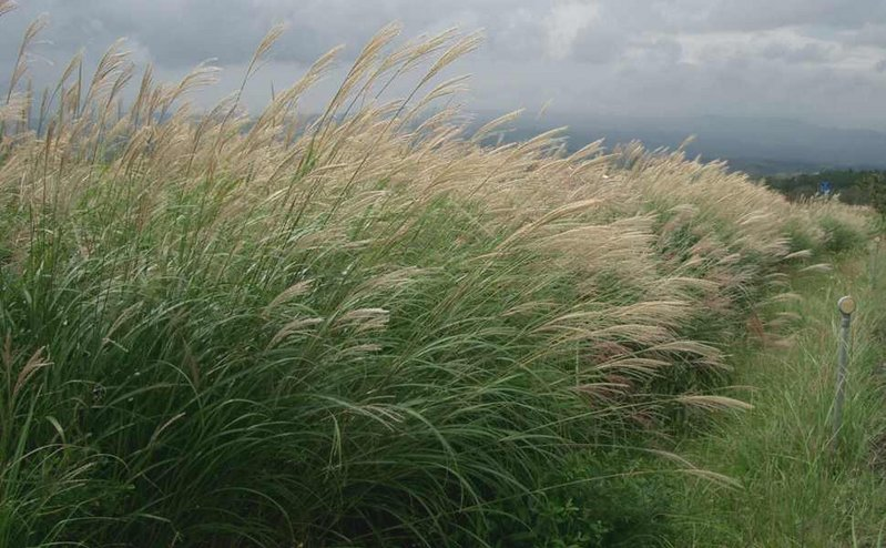 Miscanthus sinensis (ススキ)